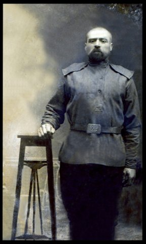 Лазарев Филлип Иванович Рядовой 502 Чистопольского полка. Участник первой